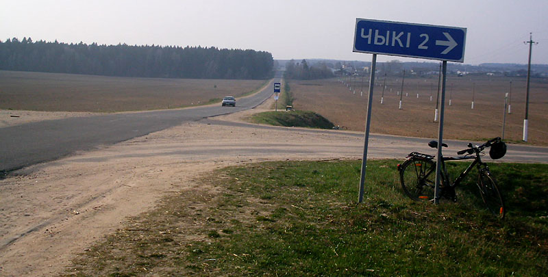 Turn to Čyki from Fanipaľ-Zaslaŭje road